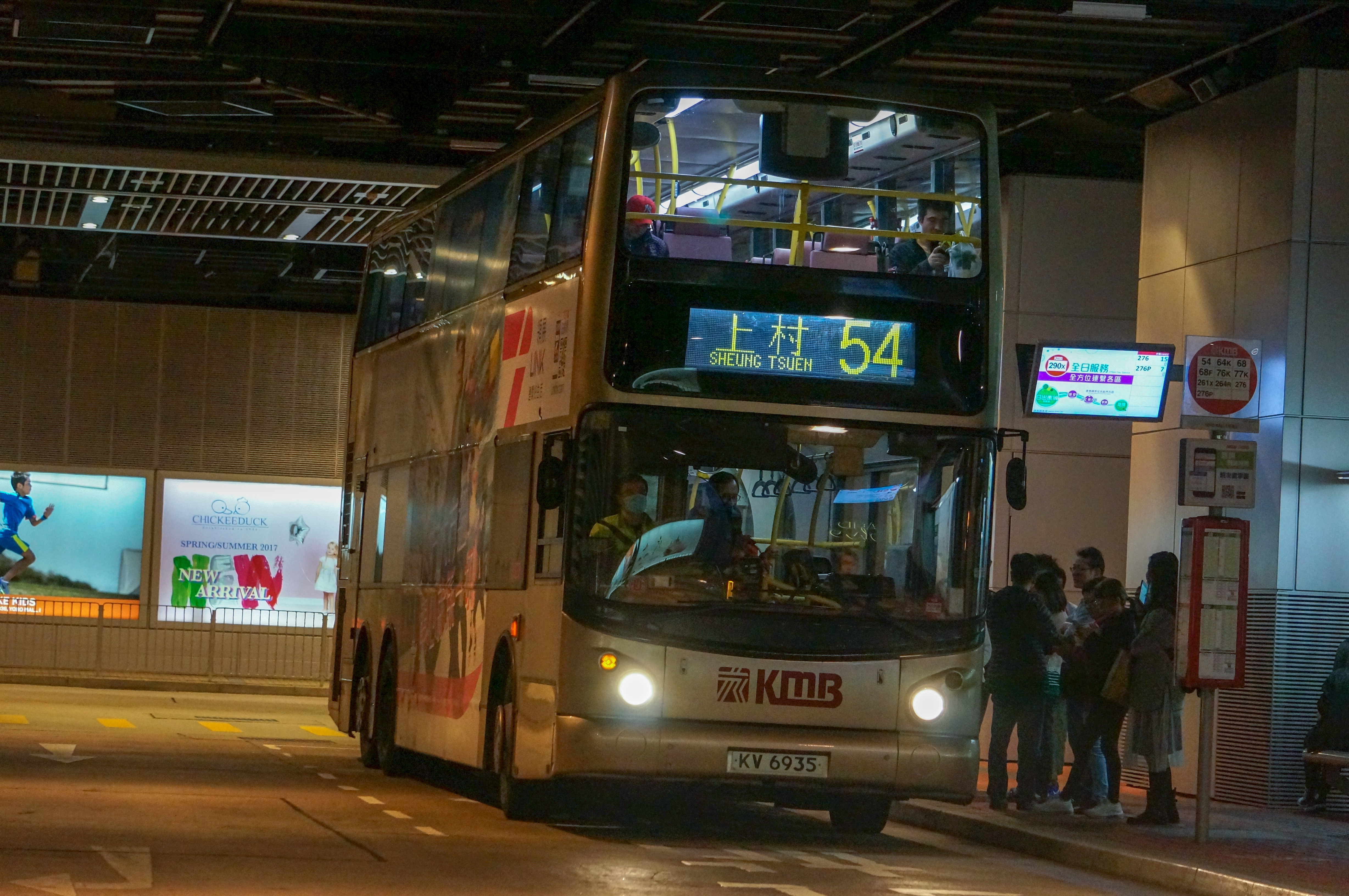 九龍巴士54線